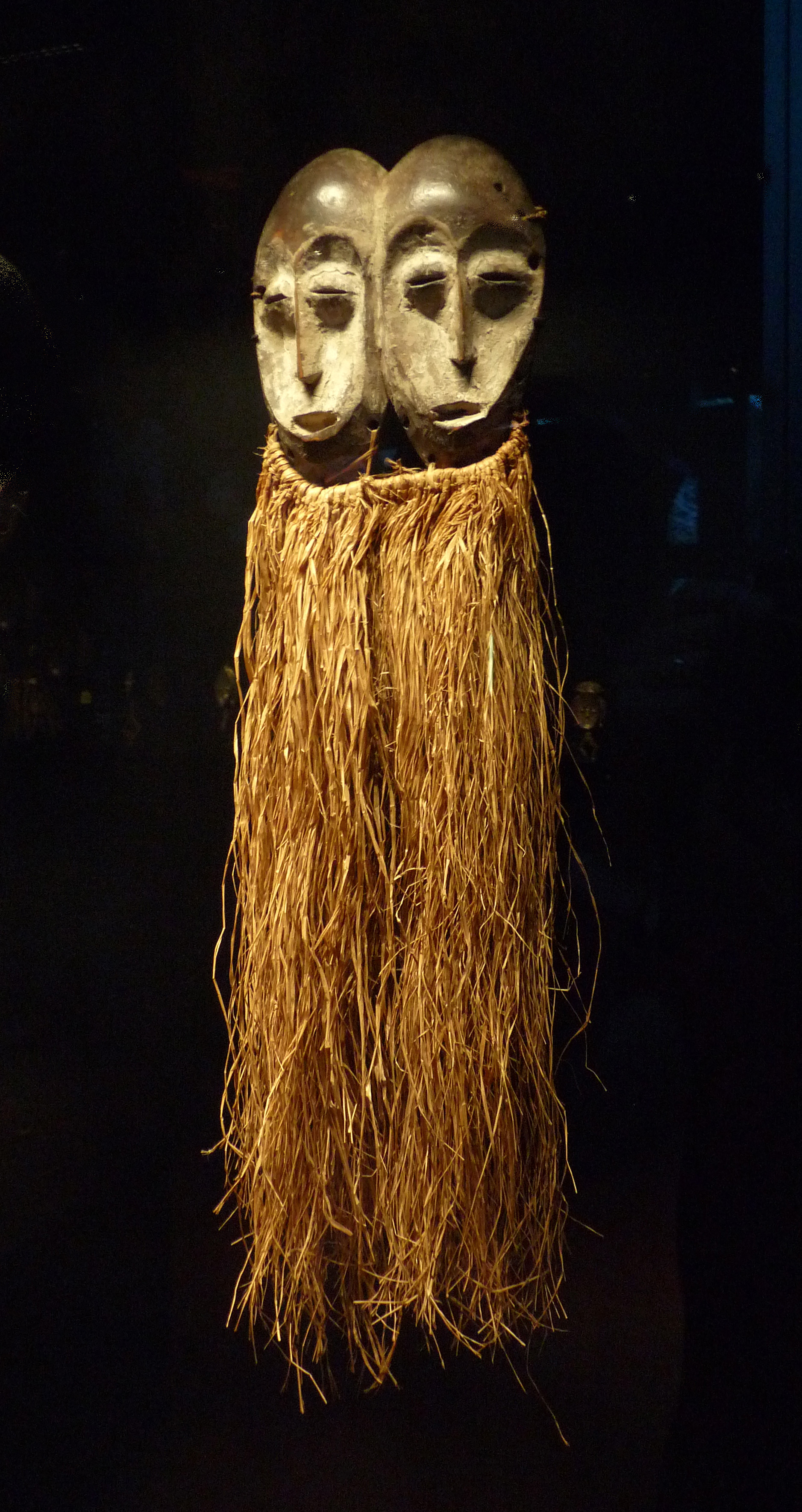 Masque à deux visages, population Lega, République démocratique du Congo. Bois, fibres végétales, pigments dont kaolin. Utilisé dans le contexte du bwami. Avant 1925. Musée du quai Branly.